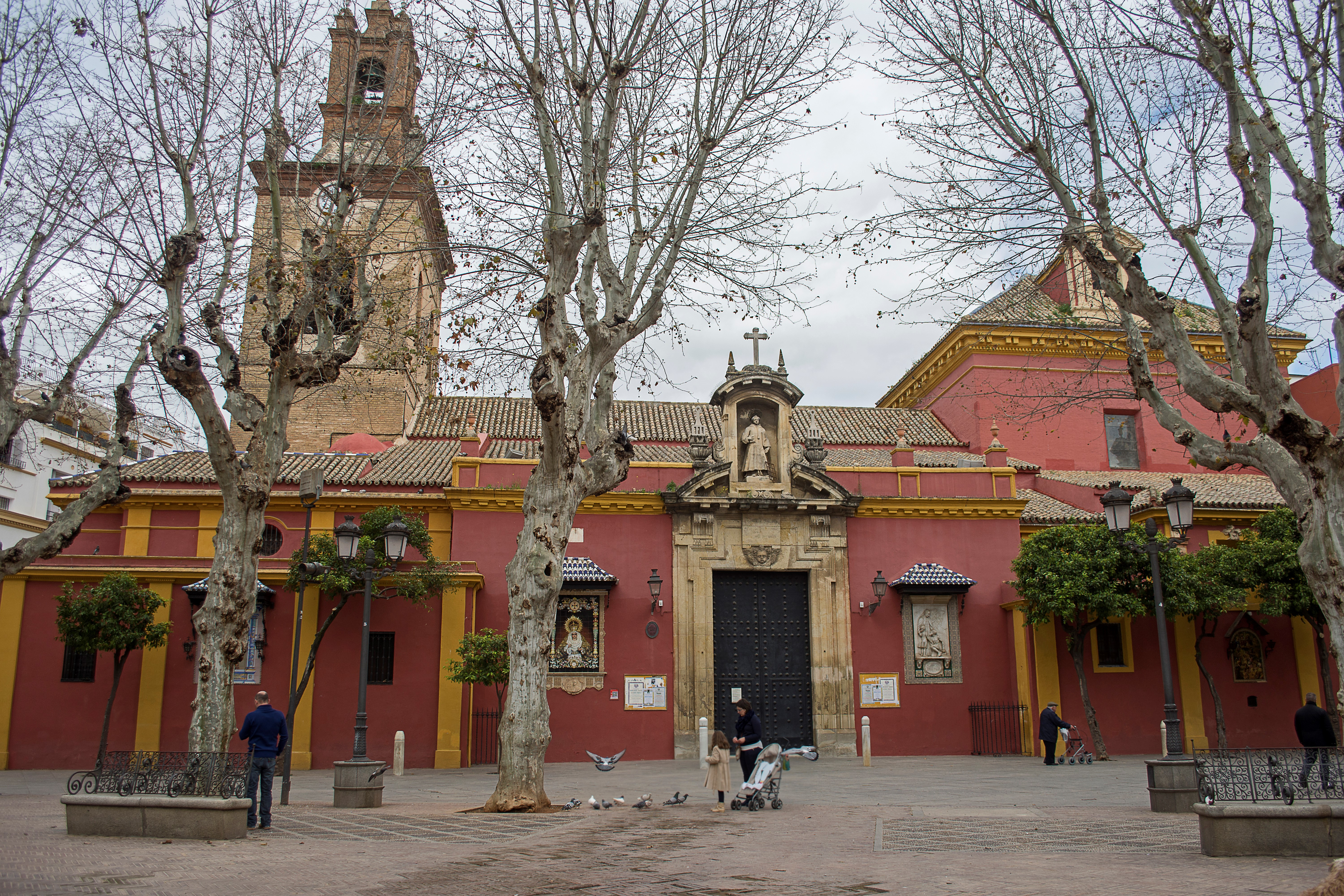 Plaza de San Lorenzo de Sevilla.